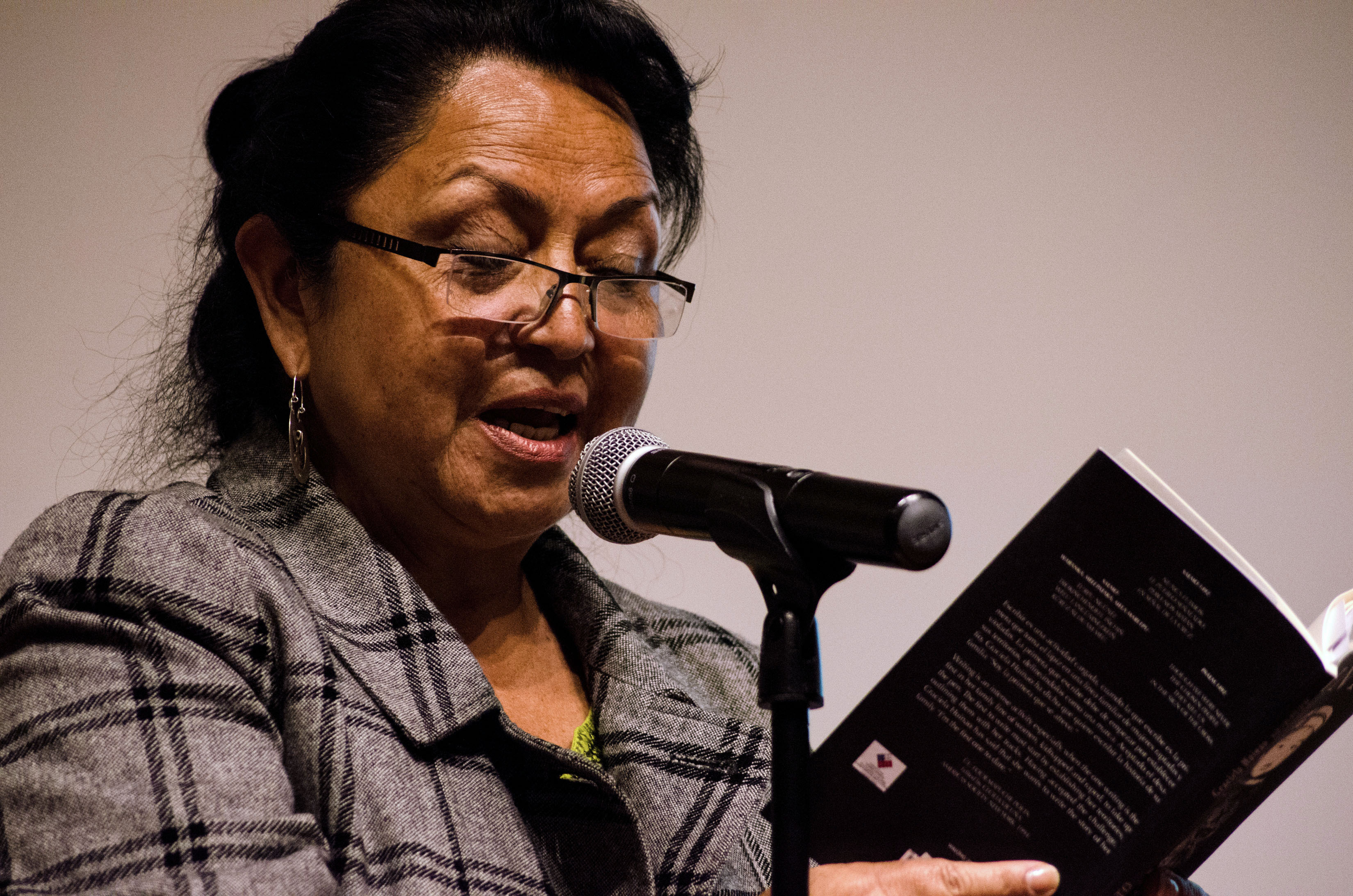 Di-Verso - Encuentro de poemas en México, en el Centro E. Garro, en la lectura de poemas con Luuk Growetz (Belgica), Graciela Huinao (Chile), Vicente Quitarte, Francisco Segovia y Carmen Villoro. Foto: Isaac Esteves / Secretaria de Cultura.